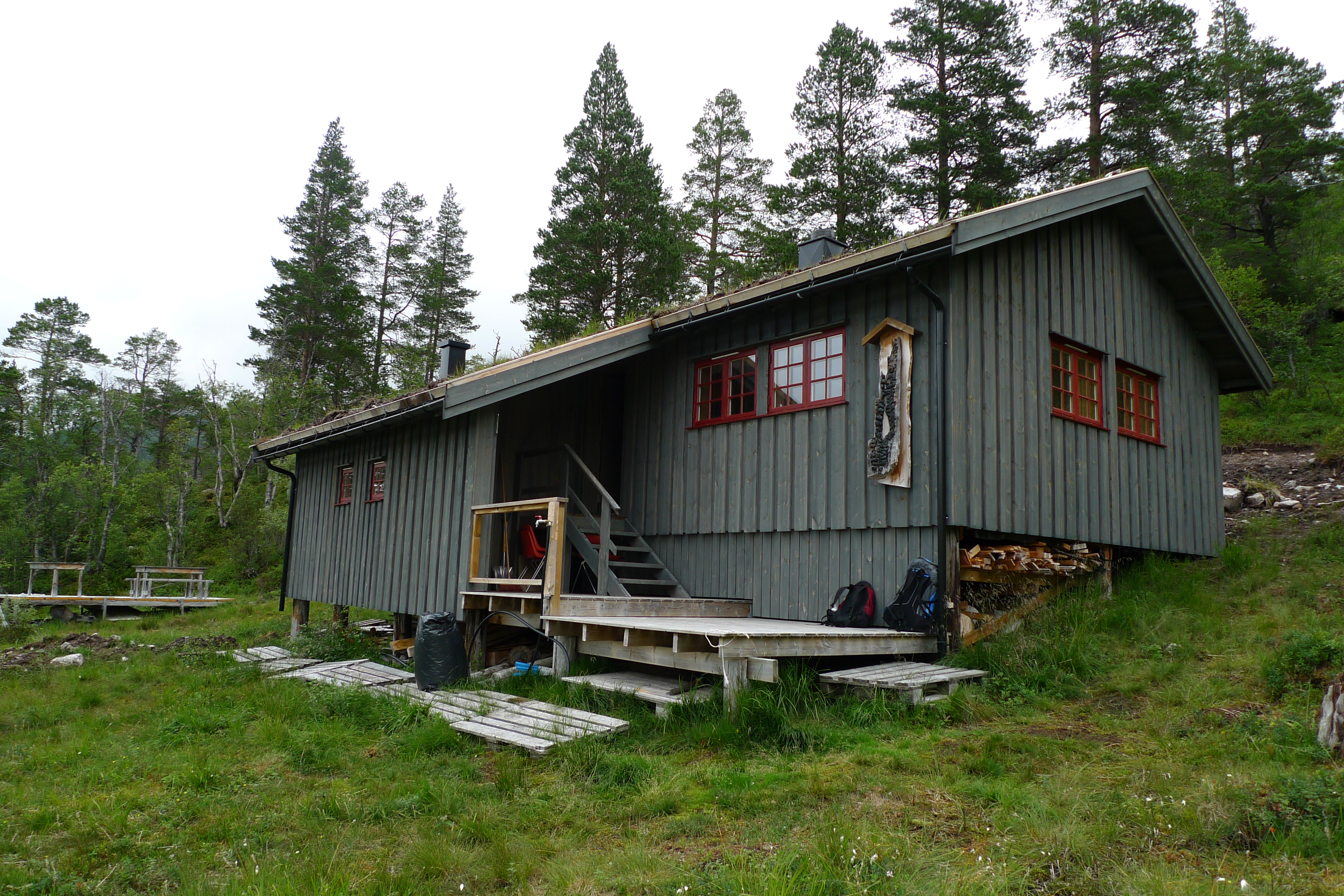 DNT-hytta Vindølbu i Surnadal kommune.